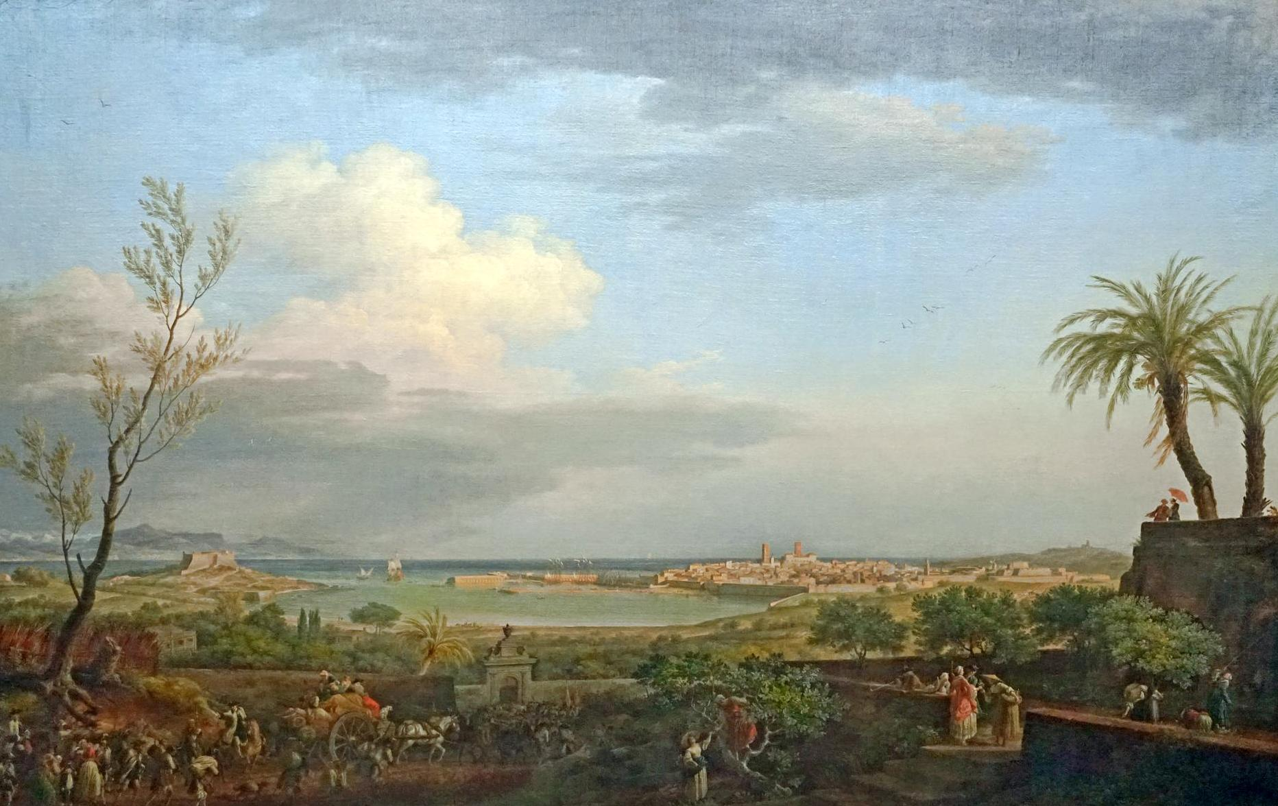 Vue de la rade d'Antibes Oeuvre de Joseph Vernet (1714-1789) 1756 Huile sur toile Dimensions : 2,63m par 1,65m Dépôt du musée du Louvre Musée national de la Marine La composition du tableau privilégie une structuration par couches horizontales au milieu desquelles apparait l'ovale de la rade d'Antibes avec son port militaire et sa citadelle conçue par Vauban. Deux groupes d'arbres sont placés de chaque coté du tableau pour lui donner du relief ainsi qu'une couleur locale avec la présence de palmiers. Au fond à gauche, on voit les cimes enneigées des Alpes aux pieds desquelles se trouve Nice (alors comté de Nice). Au premier plan, le peintre a représenté la vie locale (cueillette des oranges, flânerie des habitants...) mais également un groupe de soldats car Antibes était proche du Var (la rivière) qui constituait la frontière de la France à cette époque. la notice de l'agence photo de la RMN Site sur les ports de Joseph Vernet réalisé par le musée de la Marine Le site date du début de la décennie 2000 et les images mises à disposition sont médiocres par contre les analyses iconographiques sont très détaillées et utiles pour comprendre la structure des tableaux et leurs contenus. Au coeur du 18è siècle, les quinze peintures des ports de France commandées à Joseph Vernet, au nom du roi Louis XV, concilient la rigueur de l’observation documentaire, l’enchantement du pittoresque et la poésie du paysage. Il s’agit aussi du "récit" d’un voyage de plus de dix ans à travers la France. (Extrait du site du musée)